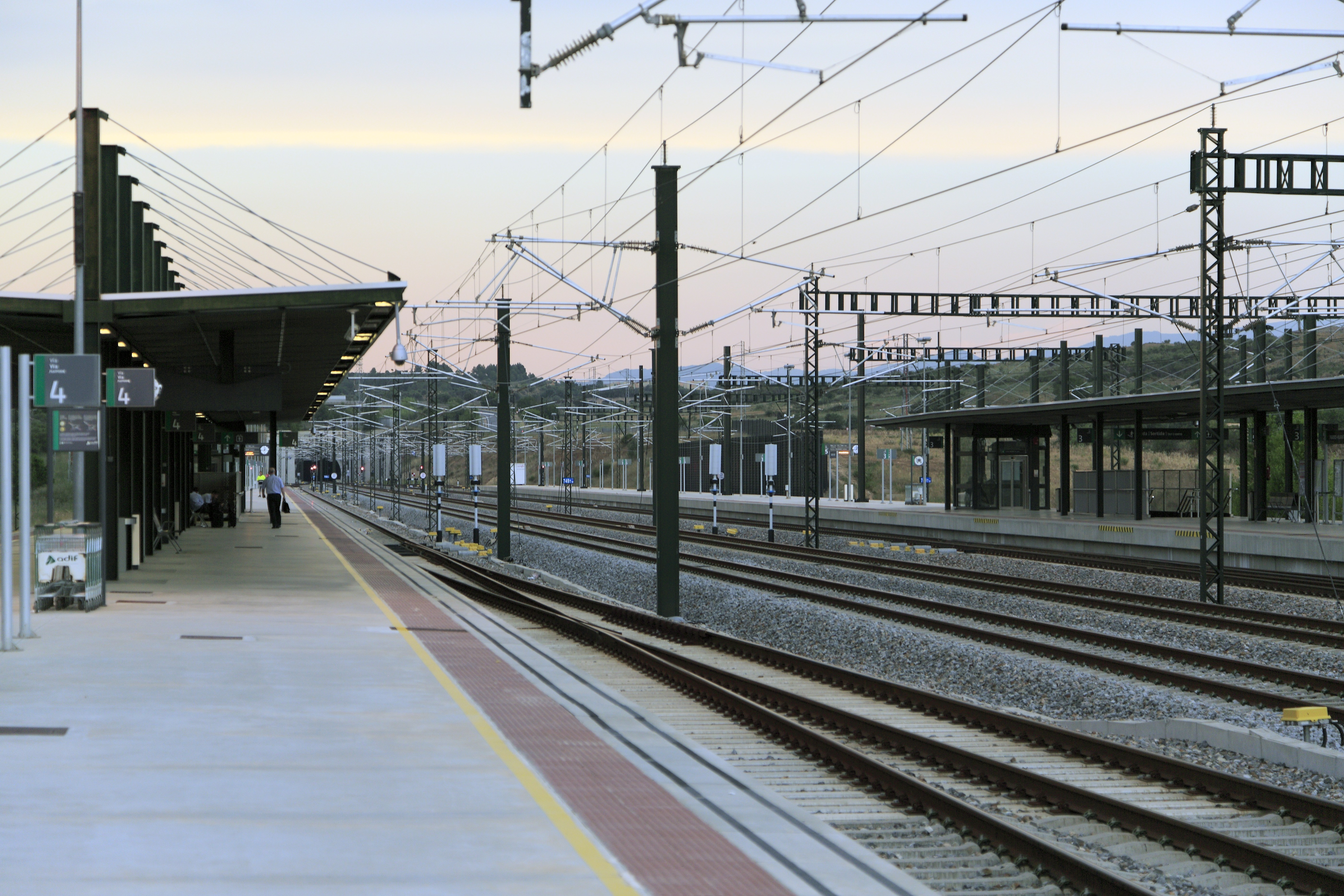 Bahnsteige Richtung Norden, im Hintergrund liegt das Südportal des Figuerastunnels. Wie auf vielen Adif-Bahnhöfen im Hochgeschwindigkeitsnetz sind die Bahnsteige so lang, dass es zwei Haltepositionen hintereinander gibt. Die Gleiszählung ist für Laien unübersichtlich, doch für den Betrieb logisch. Das durchgehende Hauptgleis Barcelona–Perpignan ist Gleis 1, das der Gegenrichtung Gleis 2. Nach außen liegen in Richtung der Kilometrierung die ungeraden, in Gegenrichtung die geraden Gleisnummern. Damit ist das Gleis in Bildmitte Gleis 4, links vom Bahnsteig liegt Gleis 6, am rechten Bahnsteig dementsprechend die Gleise 3 und 5. Das Gleis 5 ganz rechts hinter dem Bahnsteig war von 2010 bis 2013 für die Anschlusszüge über die Altbaustrecke breitspurig.